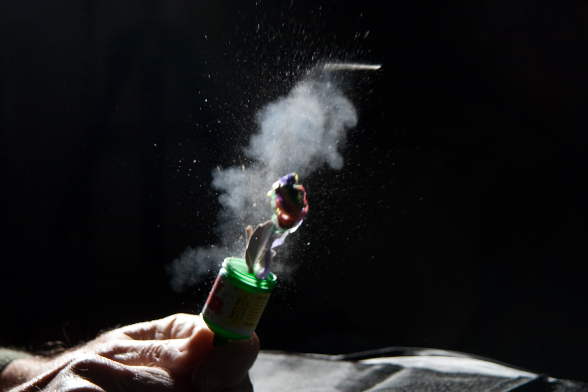 Side lit party popper